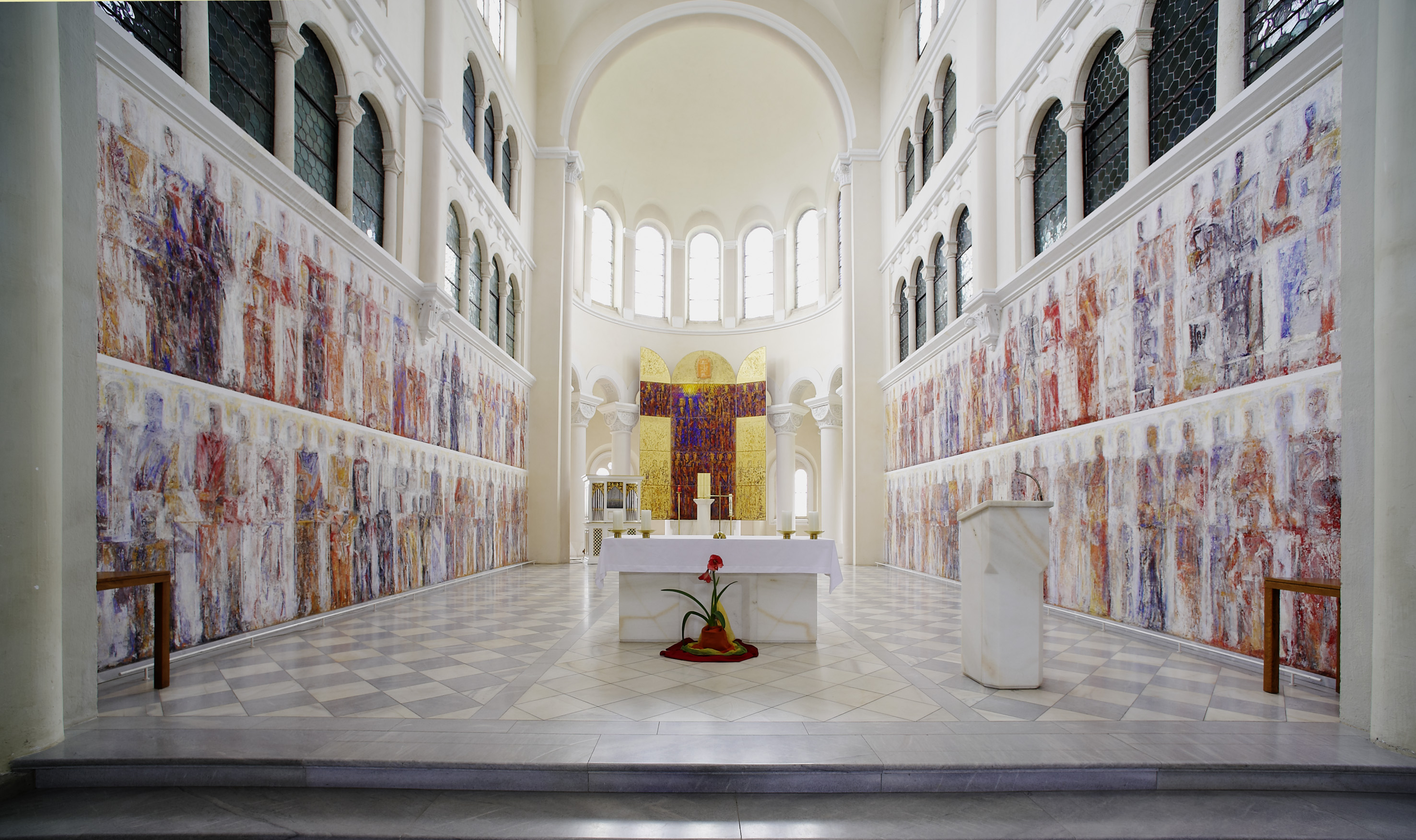 Seccomalerei und Altar der Kirche in Tanzenberg, Kärnten, Valentin Oman 1986/87 Von Mai 1986 bis Juni 1987 arbeitete Valentin Oman in der Kirche in Tanzenberg. Er gestaltete die Seitenwände des Altarraums, die beiden Seitenapsiden und das Altarbild. Für die Berarbeitung der Wände wählte er Kaseintemperafarben. In mehreren Schichten wurde die Farbe auf die Wand aufgetragen. Bilder von Menschen entstanden. Diese Bilder wurden mit Gaze überklebt, die nach dem Eintrocknen wieder abgezogen wurde. Manche Schichten lösten sich beim Abziehen von der Wand, andere blieben an der Wand fest. Durch diese Technik kamen Bilder zum Vorschein, die dem Betrachter den Eindruck alter Fresken vermitteln. Dadurch wirken sie auch nicht aufgemalt. Sie treten vielmehr aus der Wand heraus und bilden eine nie enden wollende Prozession.